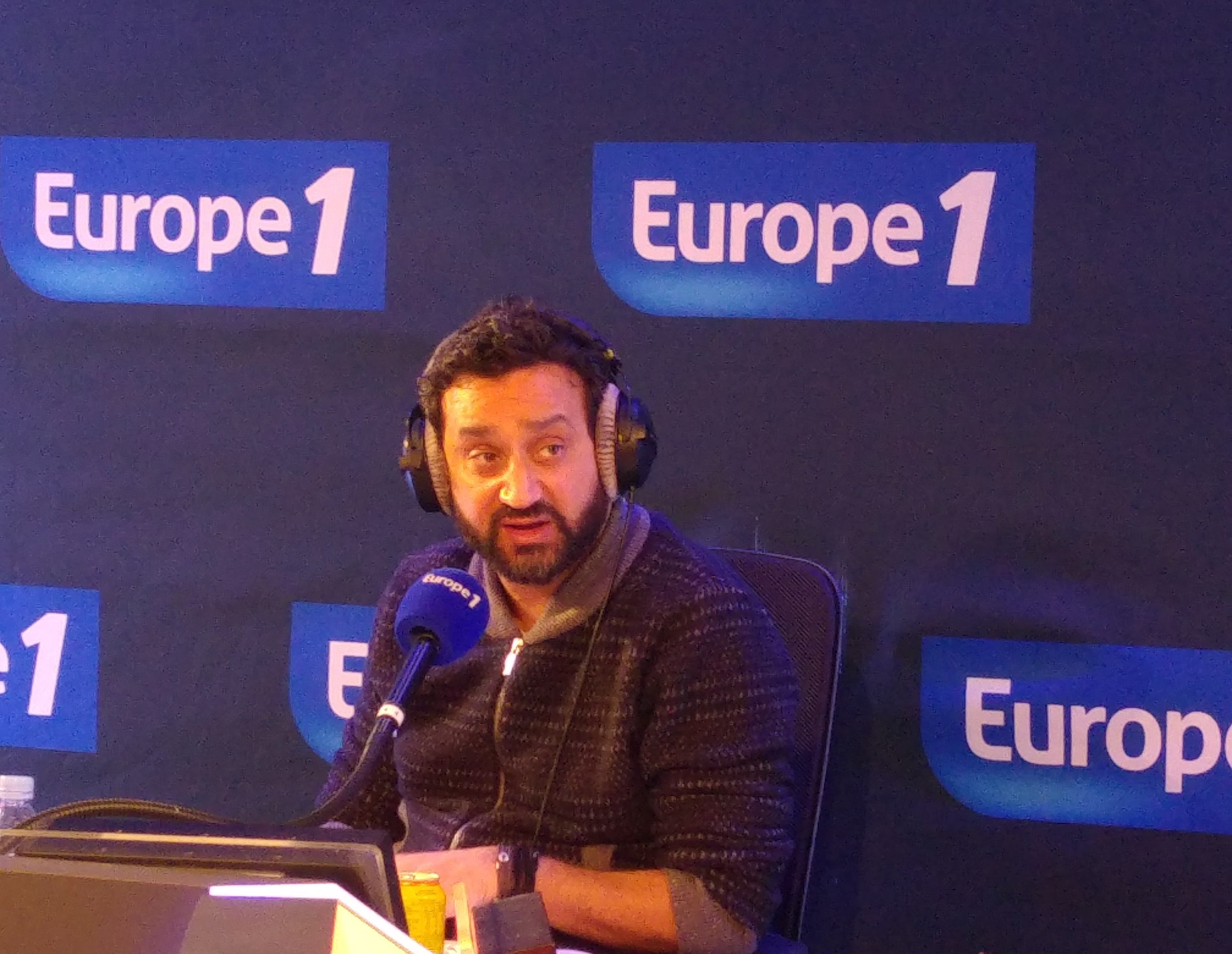 Cyril Hanouna lors d'un enregistrement d'une émission de radio